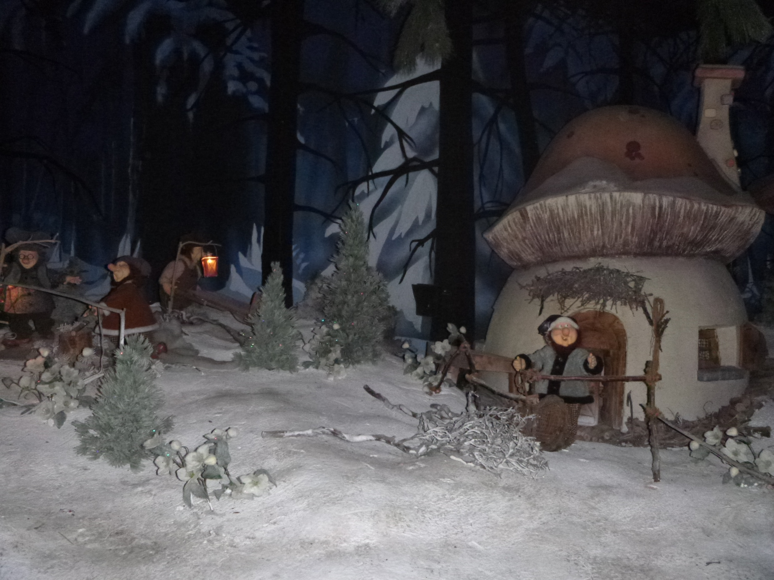 Foret de Plop hiver